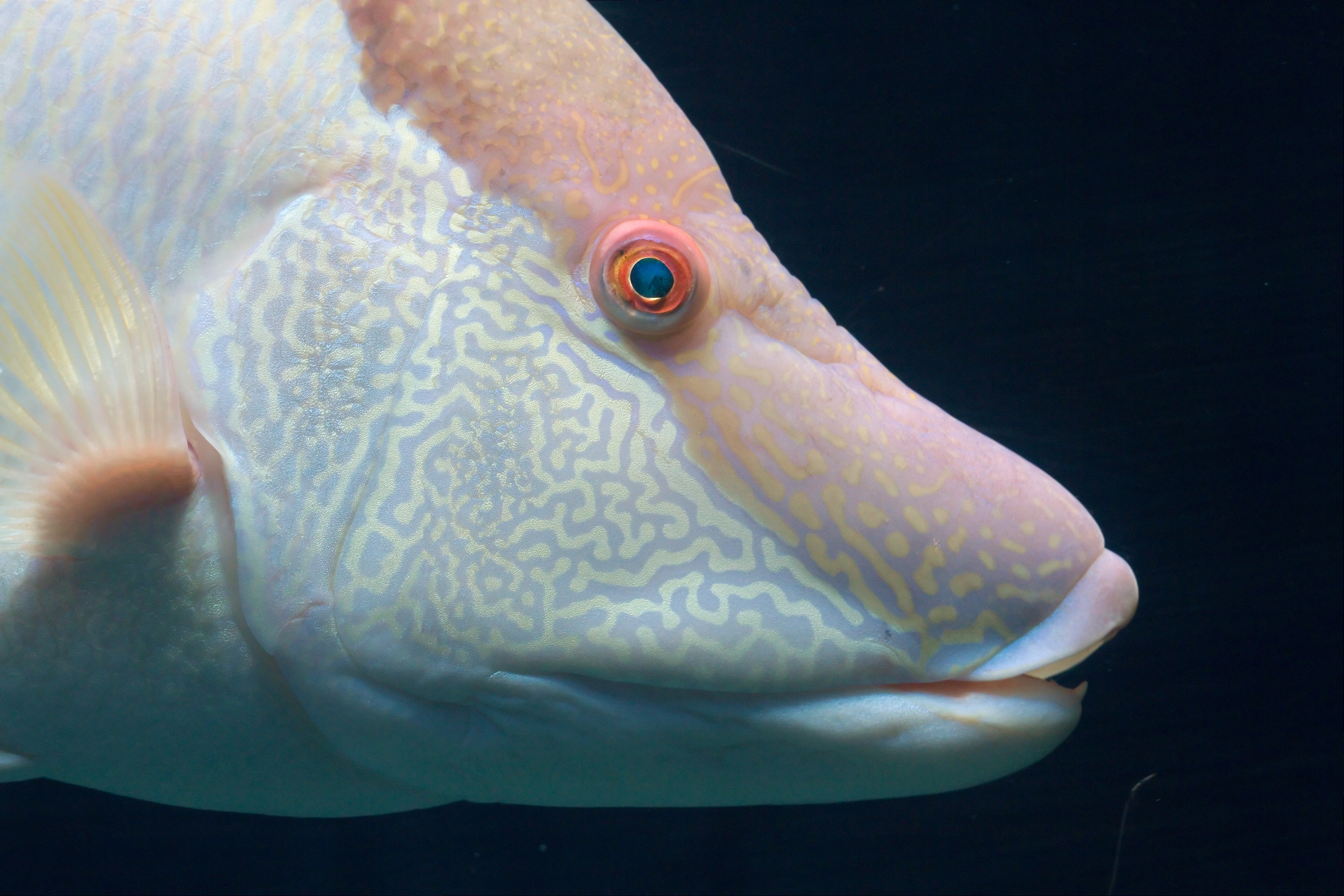 Fish